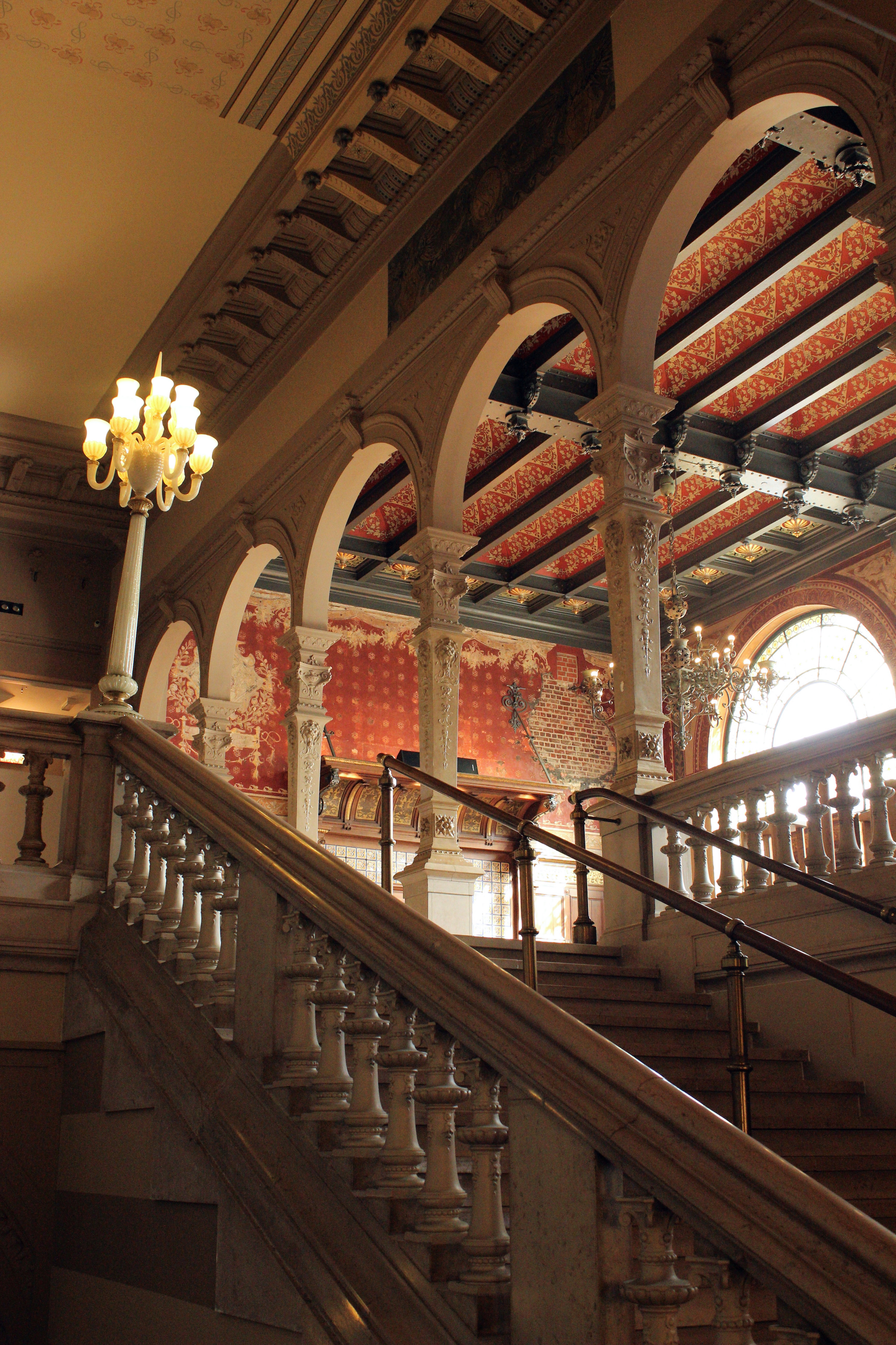 Théâtre Royal Flamand, rue de Laeken, Bruxelles